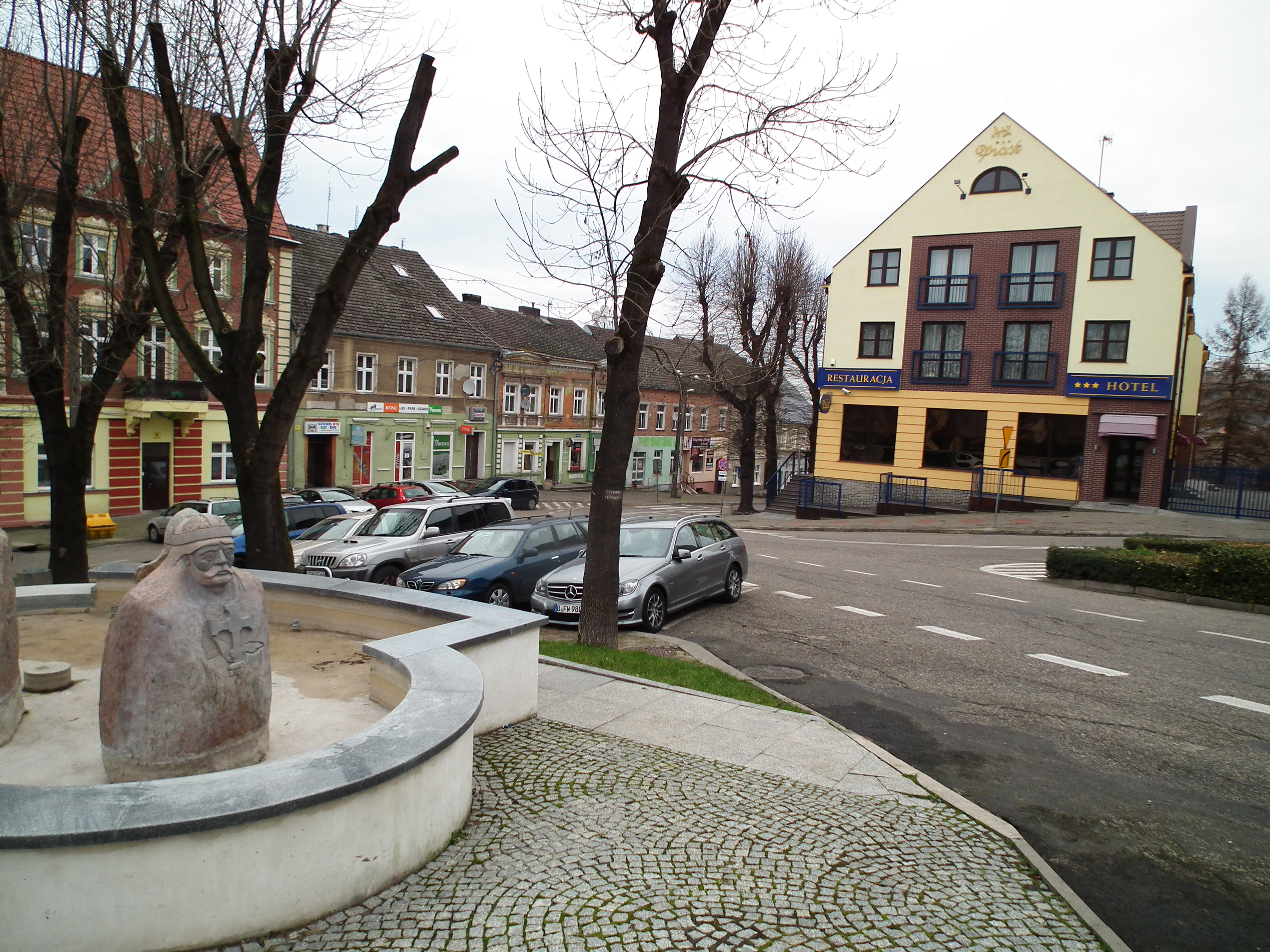 Centrum Cedyni. Hotel.